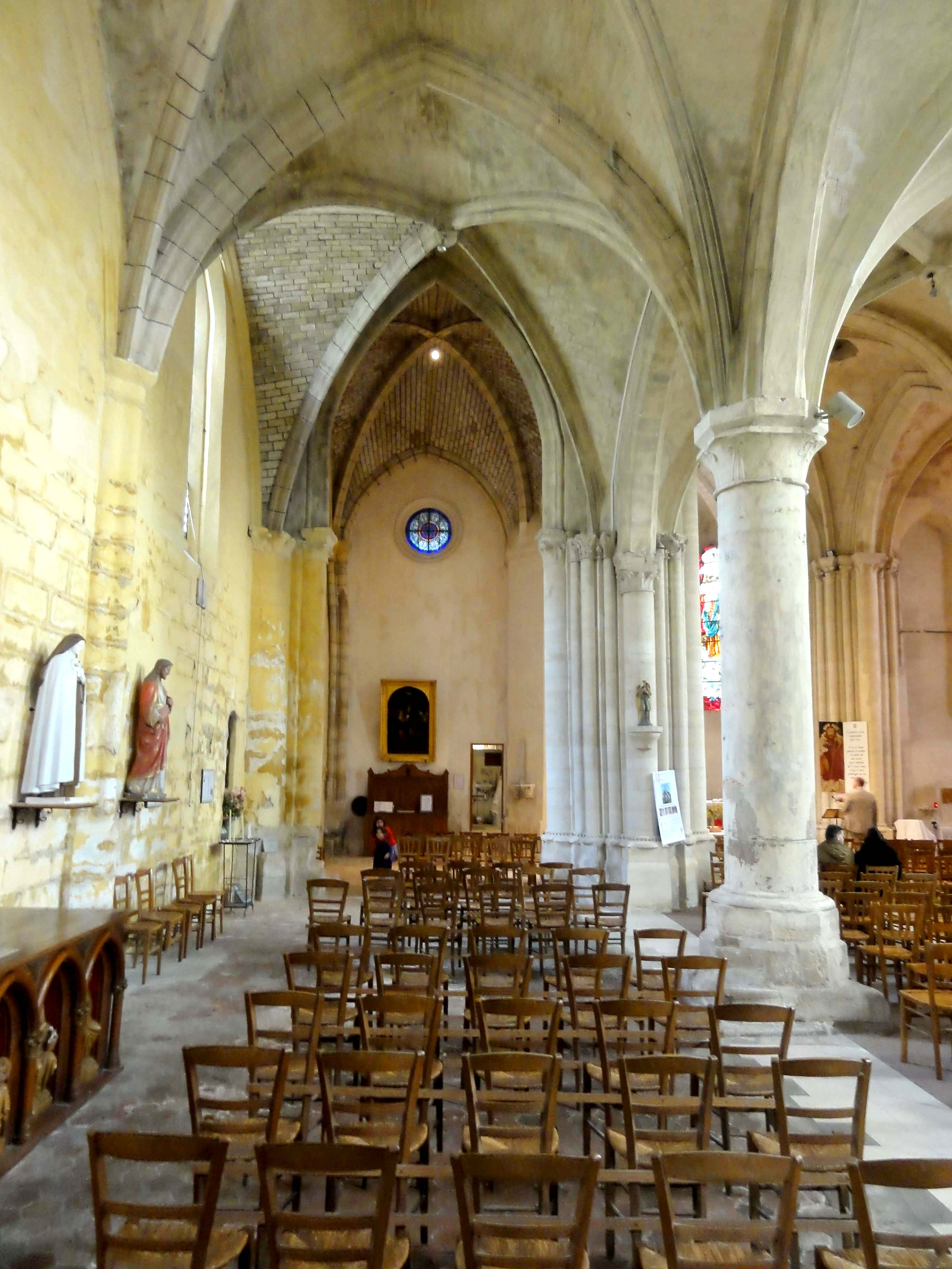 Intérieur de l'église - voir titre.